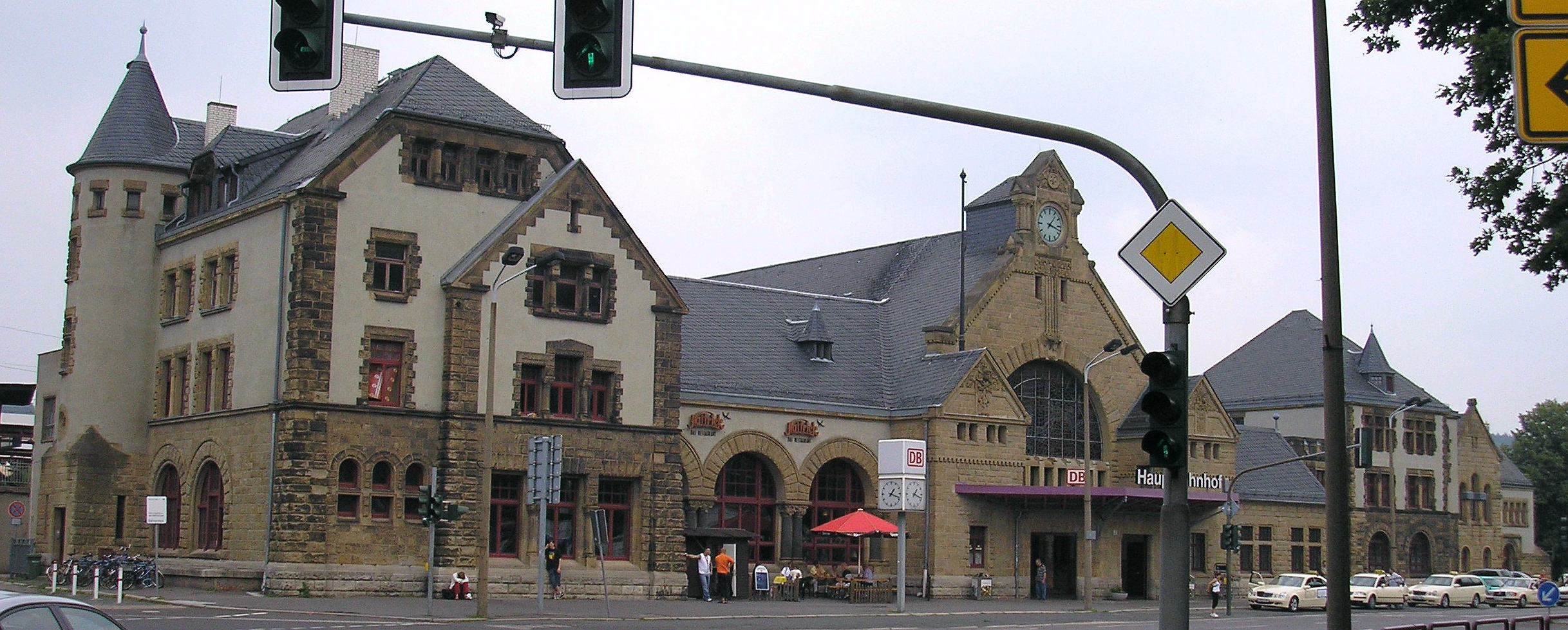 Der Eisenacher Hauptbahnhof.